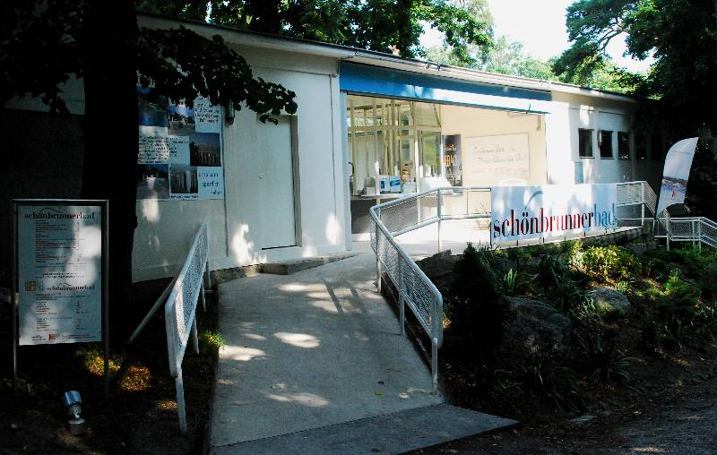 Eingang zum Schönbrunner Bad im Schlosspark von Schönbrunn